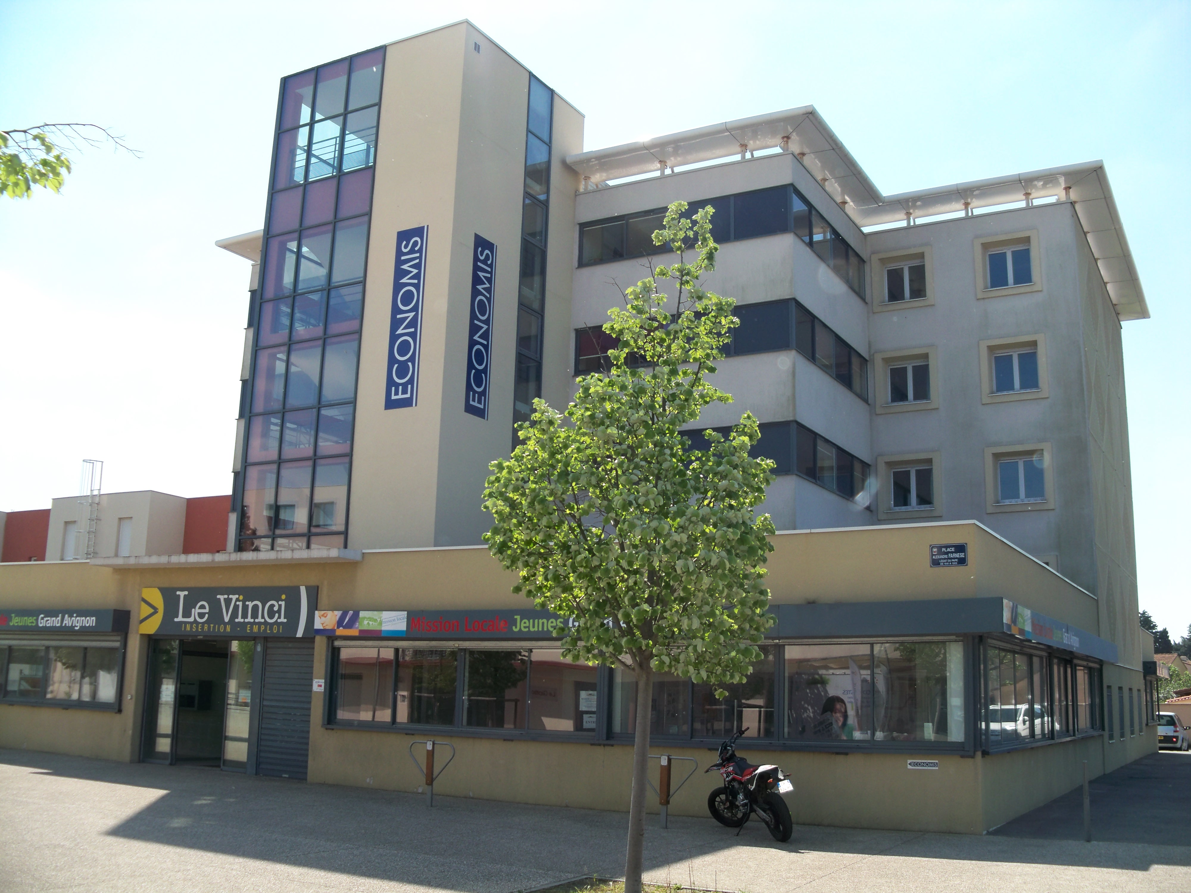 Mission locale, rocade sud